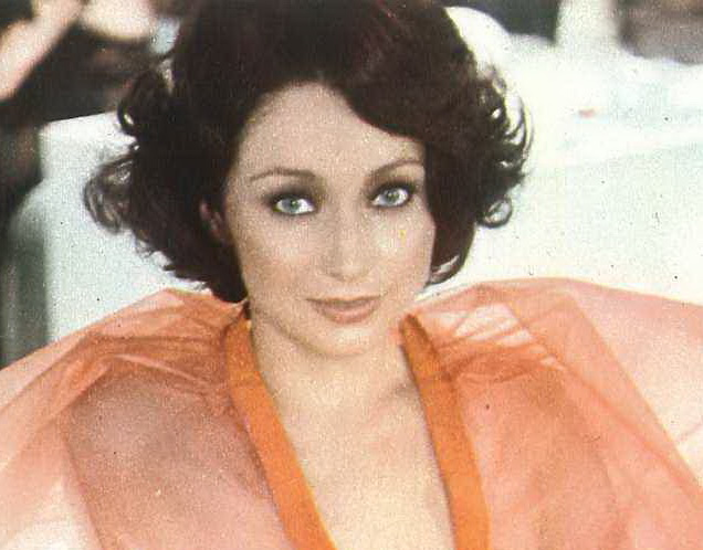 actress Monica Strebel